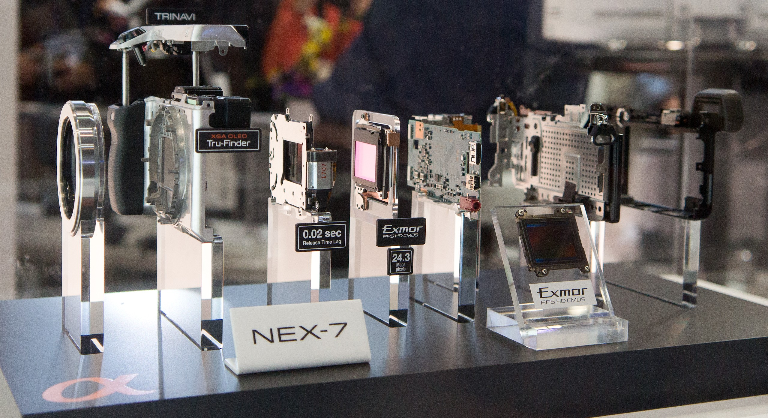 CP+ 2012: 2012 Sony NEX-7, taken apart